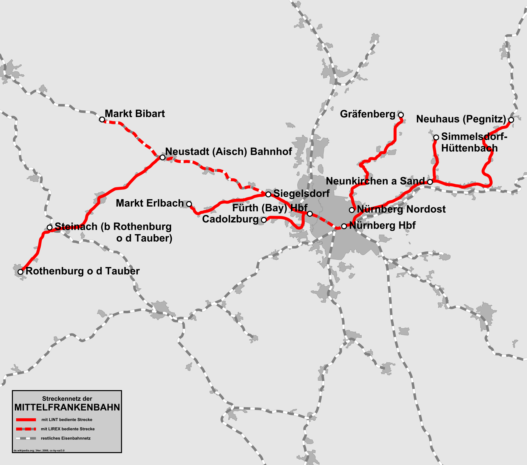 Streckennetz der „Mittelfrankenbahn“ (Start: Dezember 2008)